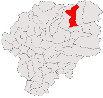 Categorie:Hărţi ale judeţului Bistriţa-Năsăud